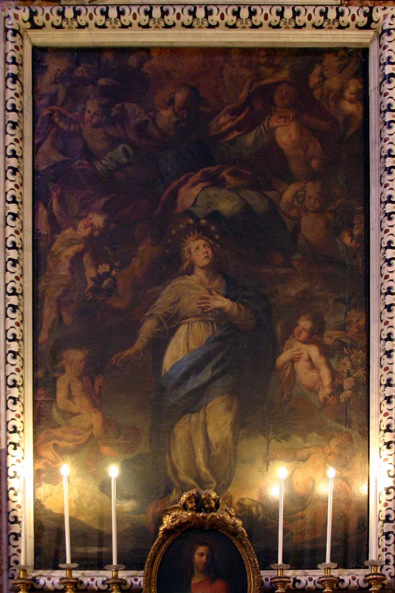 San Ferdinando, Nápoles Immacolata di Cesare Fracanzano